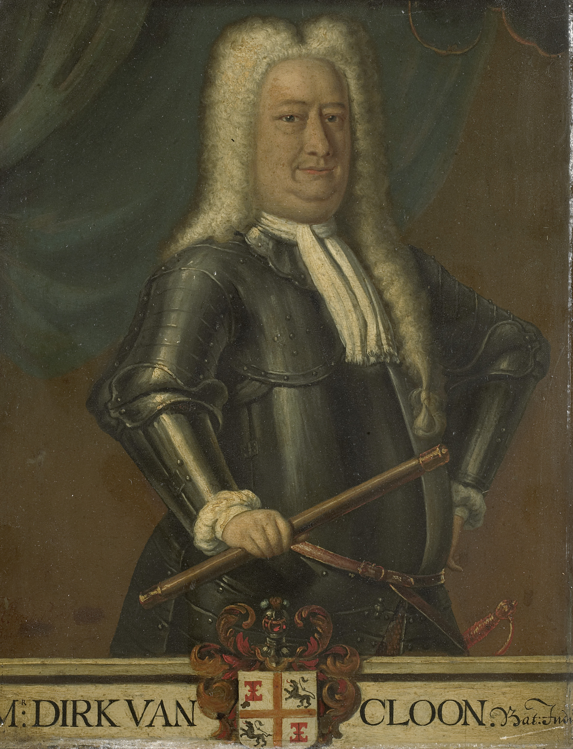 Portret van Dirk van Cloon (1684-1735). Gouverneur-generaal (1730-35). Staande, ten halven lijve naar rechts, in wapenrusting. Commandostaf in de rechterhand, de linkerhand in de zij. Onderdeel van een reeks van kopieën naar portretten van de gouverneurs-generaal van het voormalige Nederlands Oost-Indië, waarschijnlijk afkomstig van de Verenigde Oostindische Compagnie. Vrije kopie naar SK-A-3776. Collection: schilderijen; Gouverneurs-generaal serie